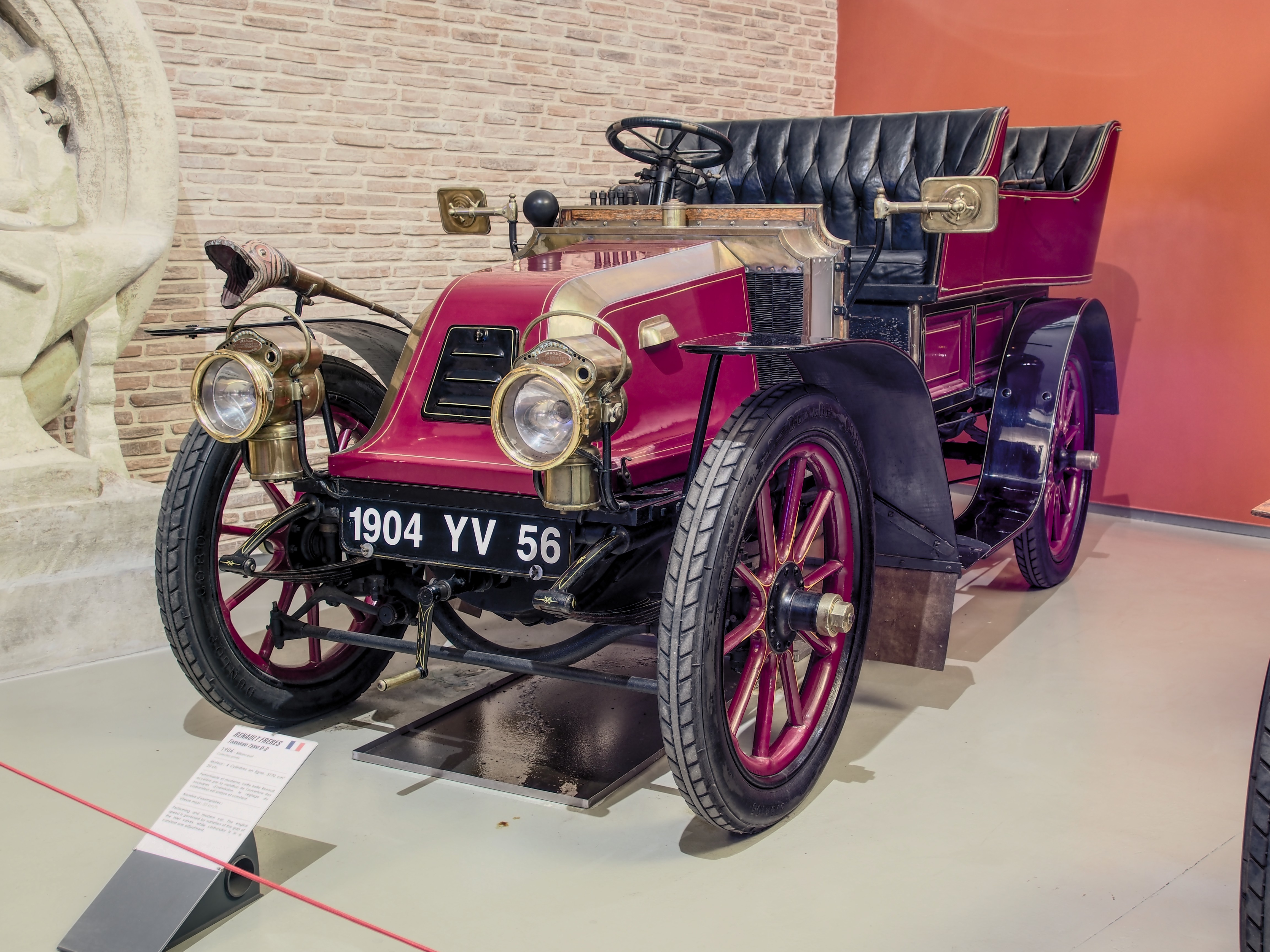 Photographed at Musée des 24 Heures du Mans, France.